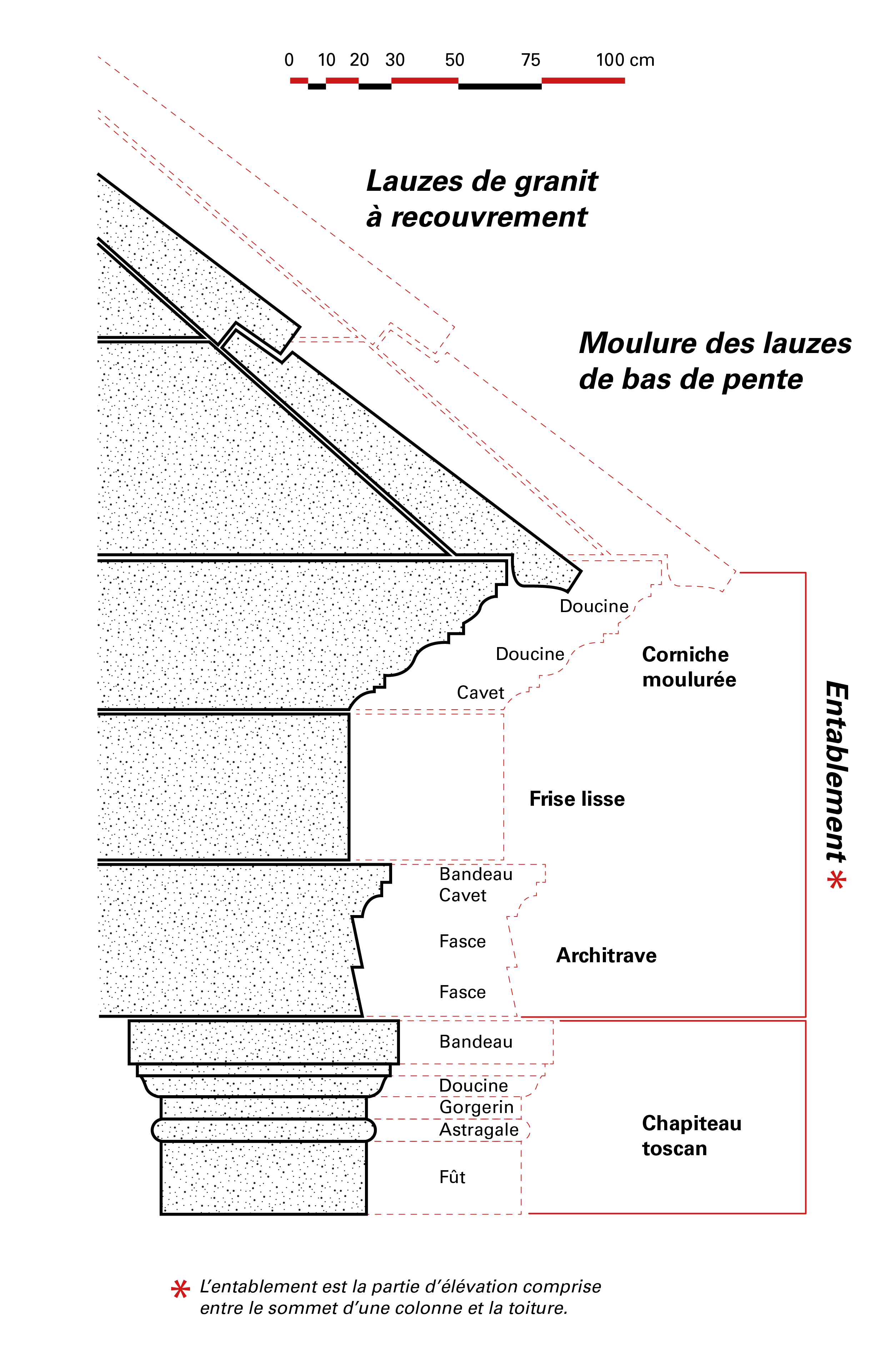 Décor architectural du mausolée du site archéologique gallo-romain des Cars, d'après les travaux de Jean-Louis Paillet et Marie-Christine Monguillan